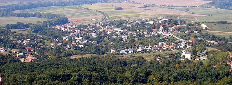 Pohľad na obec Ruská Nová Ves zo zrúcaniny Zbojníckeho zámku, okres Prešov, región Šariš.